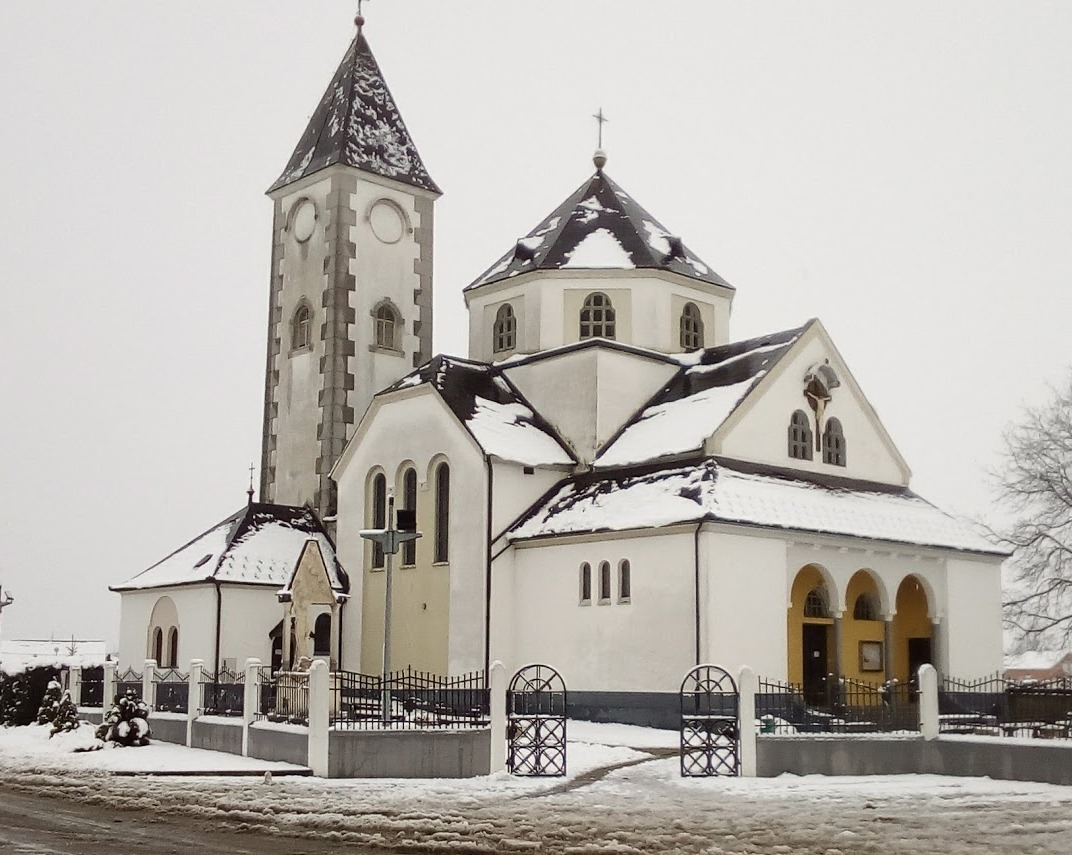 Župna crkva sv. Mihaela arkanđela u Sračincu, sagrađena 1925.